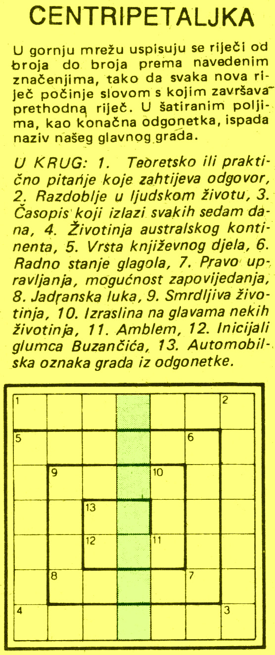 centripetaljka